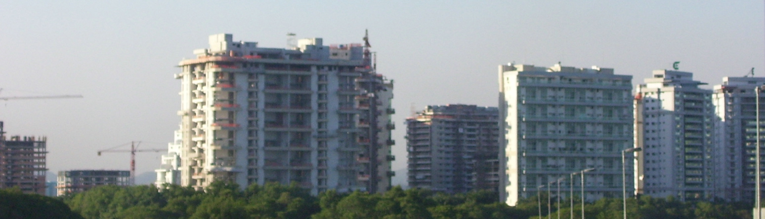 Vista da Península, na Barra da Tijuca, Rio de Janeiro, Brasil.